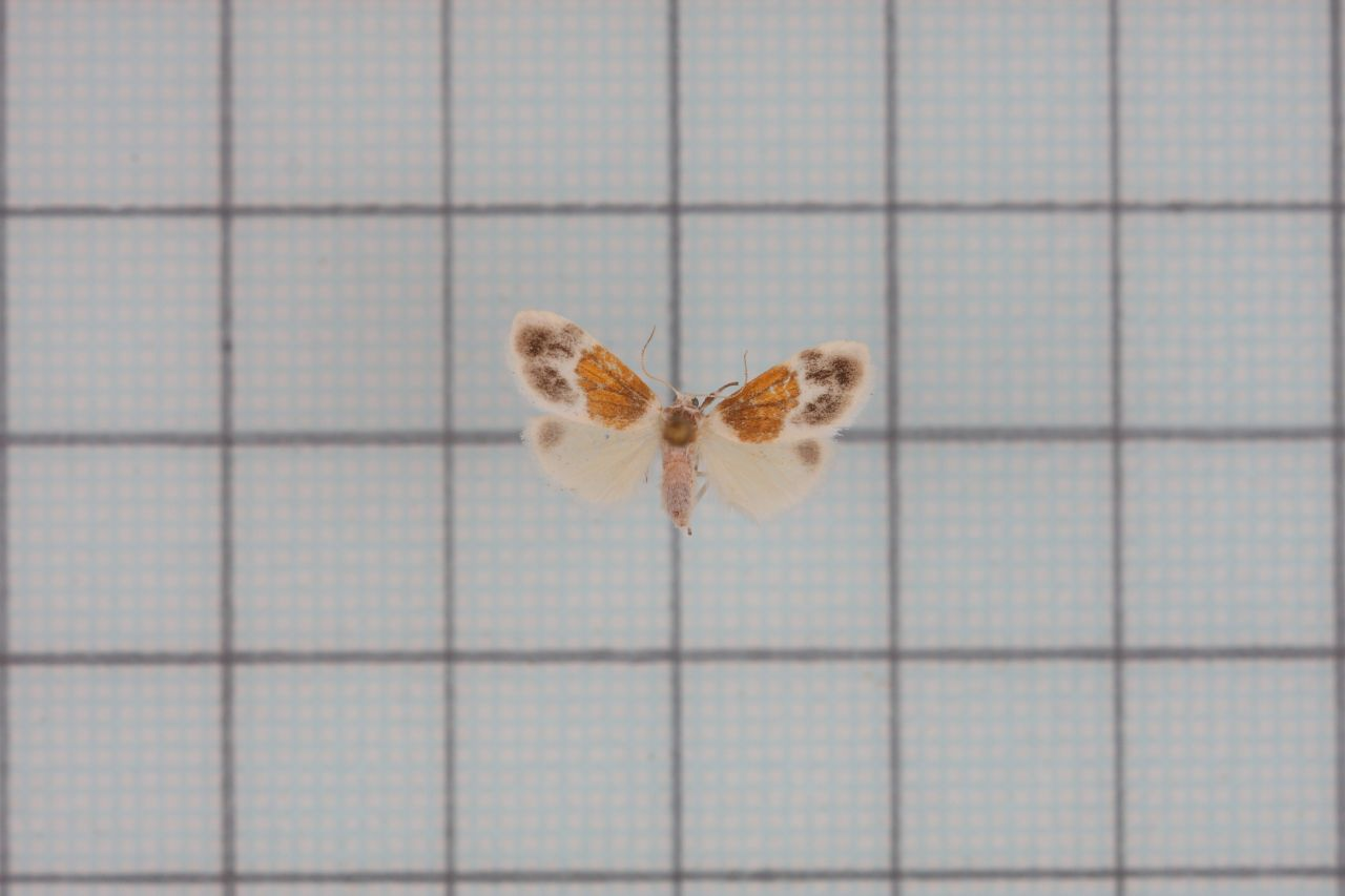 Gymnasura semilutea (Wileman,1911) 基黃苔蛾 認識台灣的昆蟲 7 燈蛾科:P.132